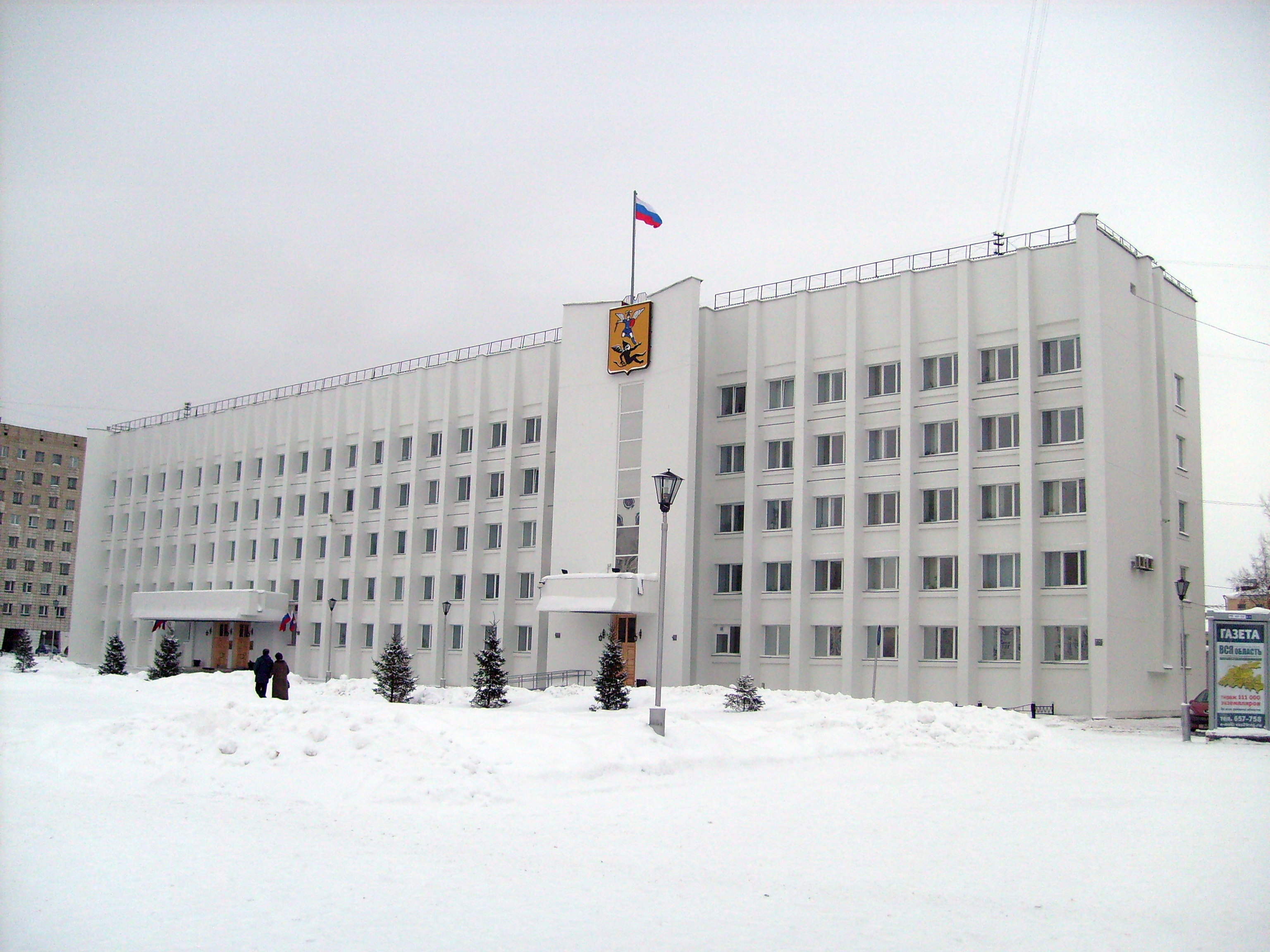 Архангельск, пл. Ленина, 5. Администрация города Архангельска, Архангельское городское собрание депутатов.